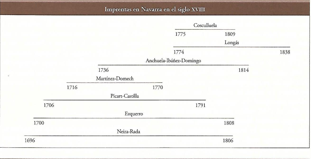 Navarra. imprentas, siglo XVIII